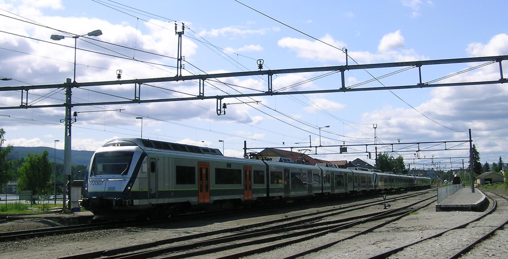 Prøvekjøring av trippelsett type 72 i fellesstyring (multippel). 30. mai 2012. Så lange tog kjøres ikke i ordinær persontrafikk. Vikersund stasjon.